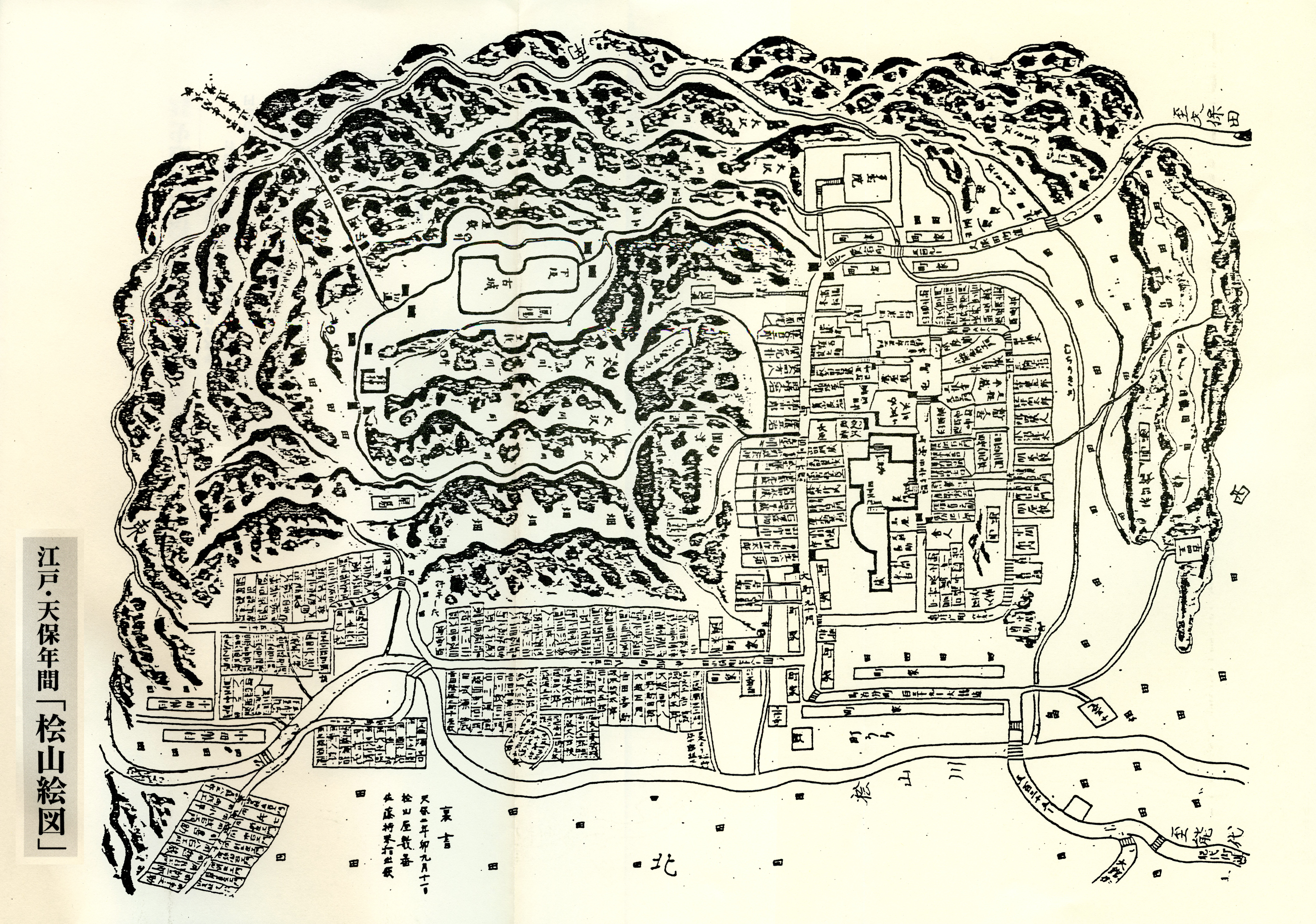 天保二年⁽1832年⁾「桧山絵図」久保田藩.山本郡